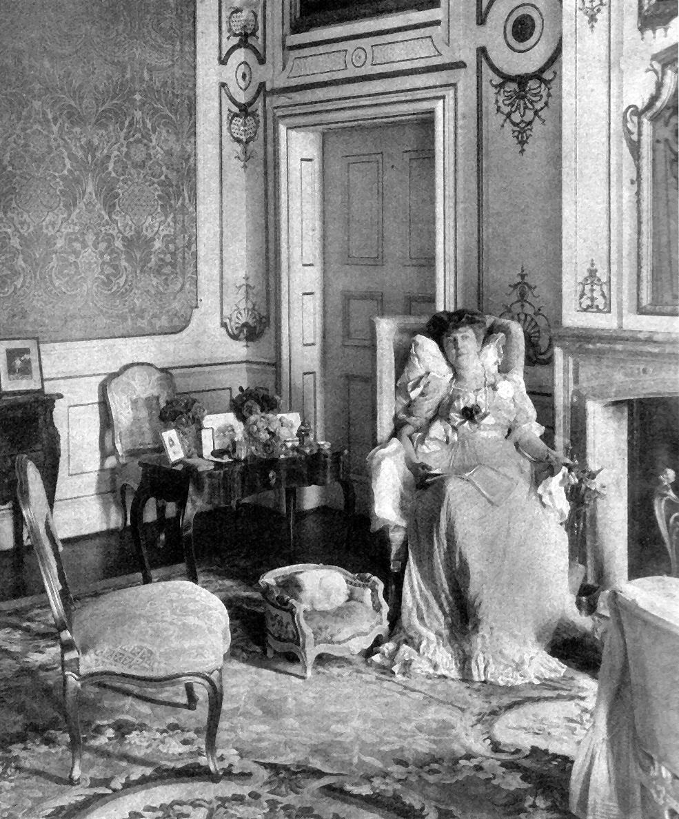 Hedwige de Ligne, Herzogin von Arenberg, im Grünen Salon des Schlosses Nordkirchen